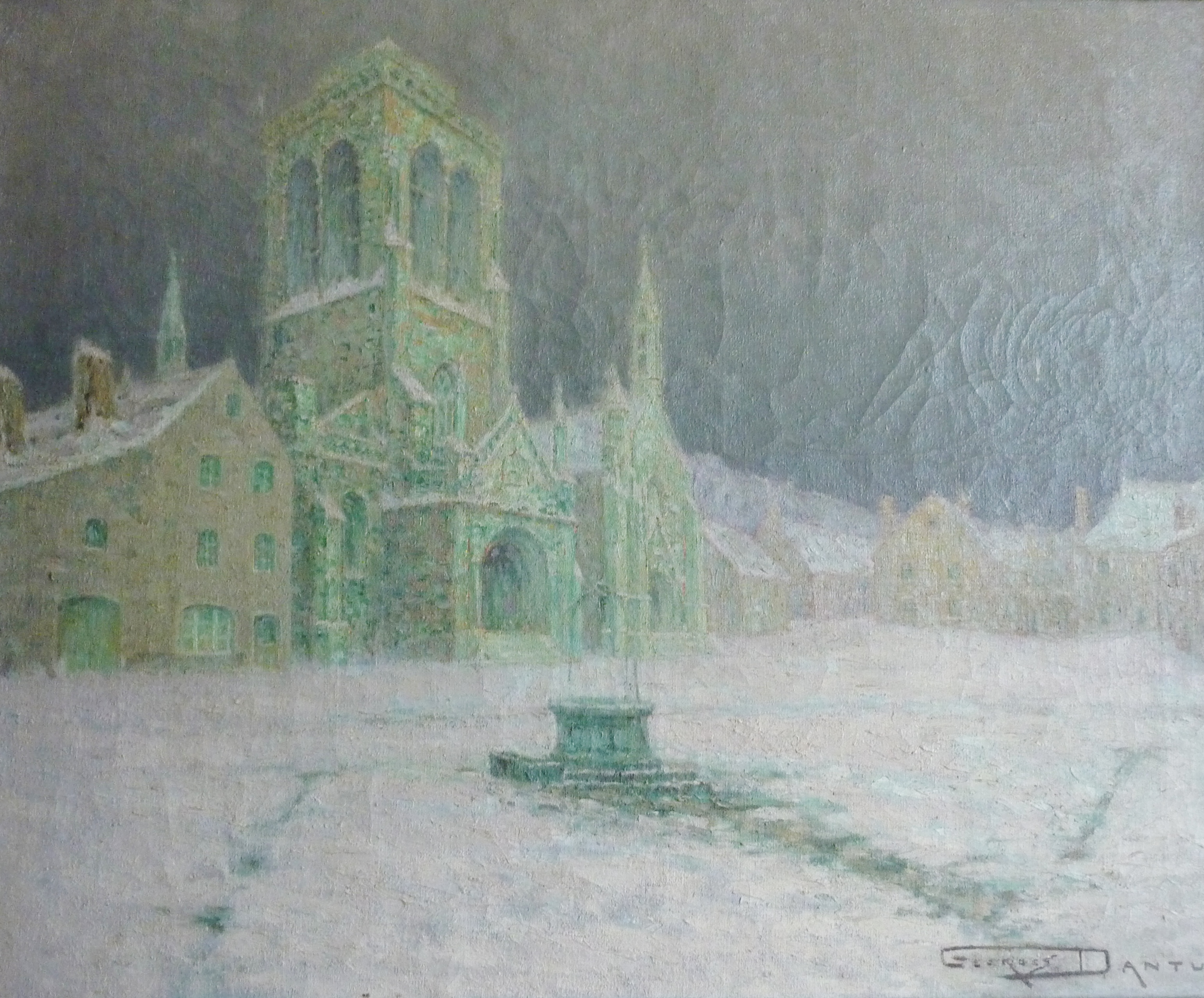 Georges Dantu : Locronan sous la neige vers 1934 (huile sur toile, musée de Locronan)